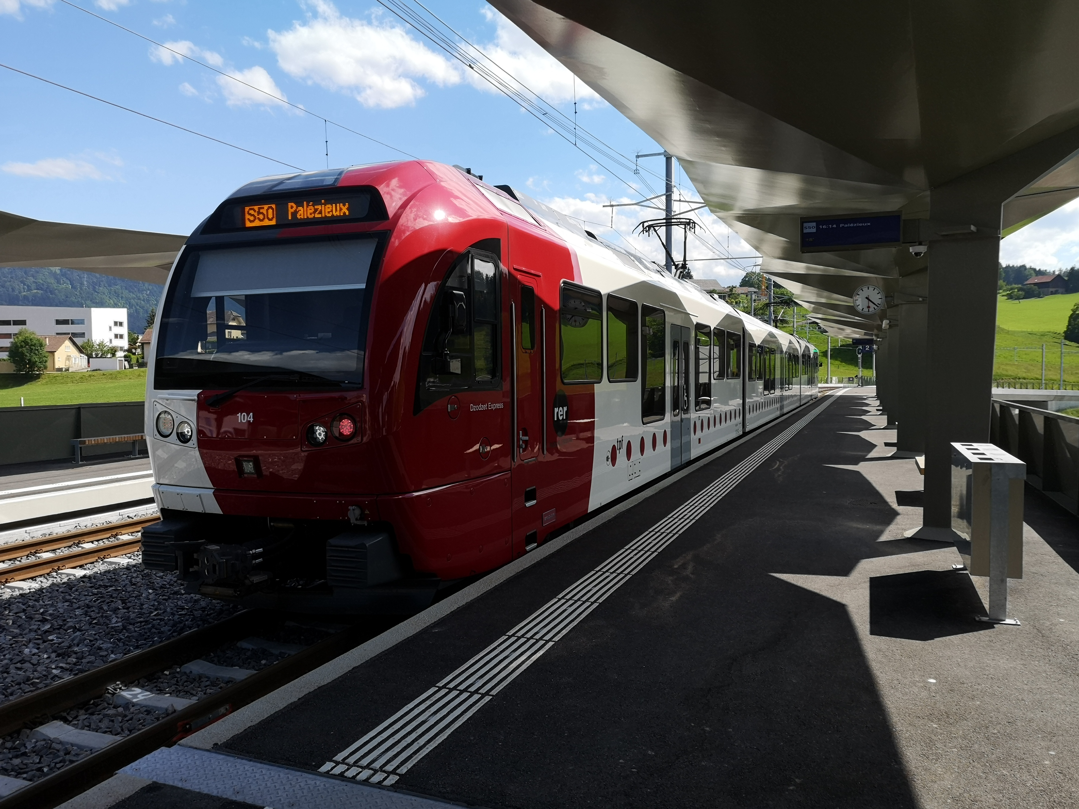 Le Dzodzet Express, rame des Transports publics fribourgeois roulant en tant que S50 vers Palézieux, dans la nouvelle gare de Châtel-Saint-Denis ouverte en 2019.